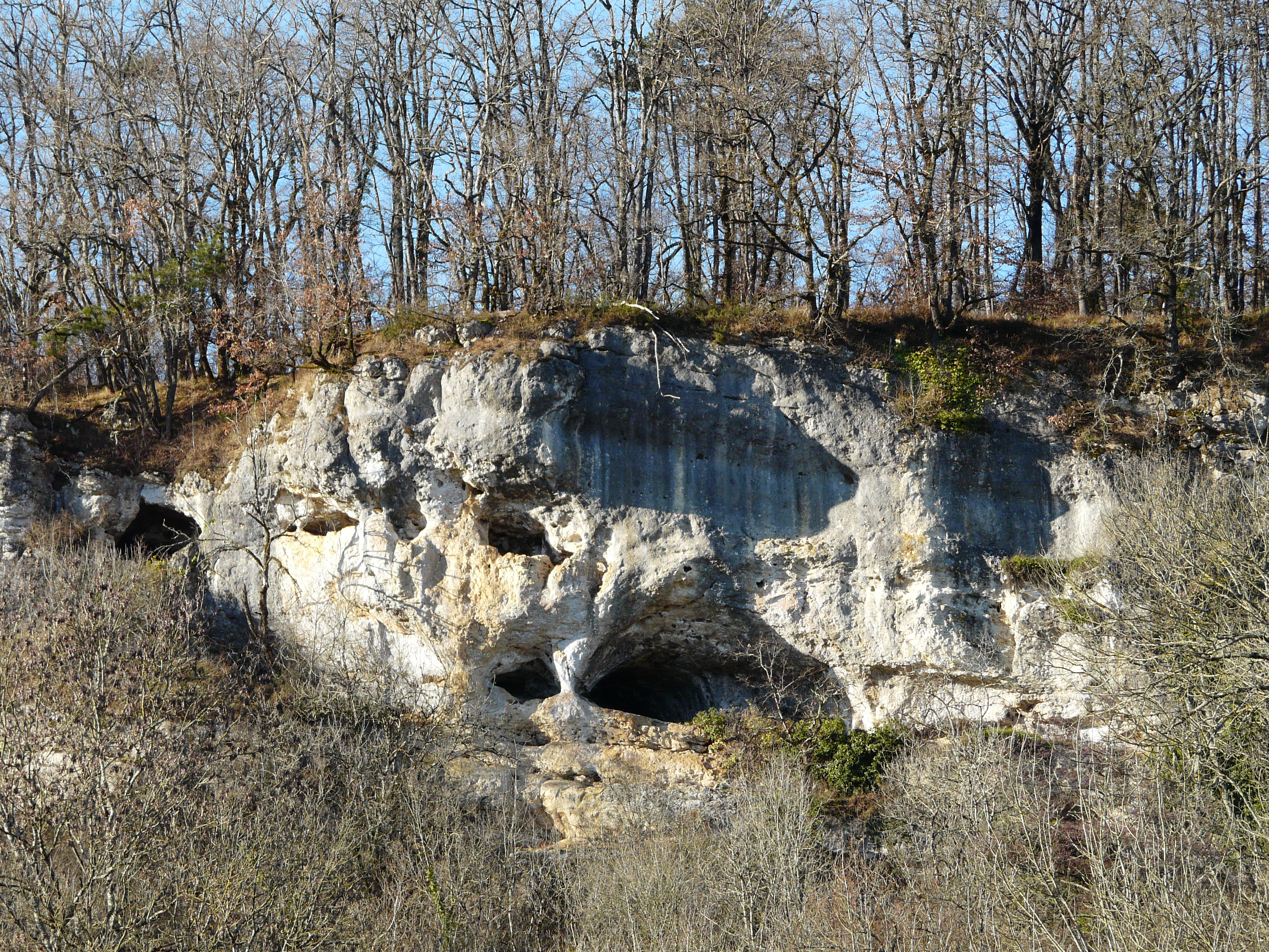 Falaise et grottes de Rochecaille,La Chapelle-Faucher, Dordogne, France